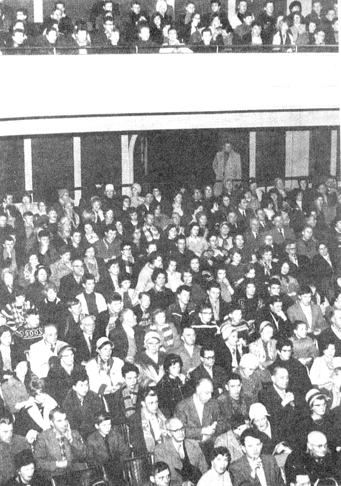 Møte i Stavanger Forelesningsforening. Årstall ukjent.